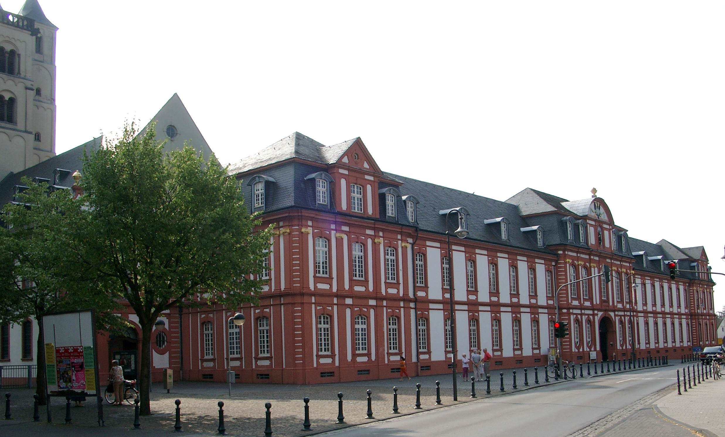 Abtei Brauweiler